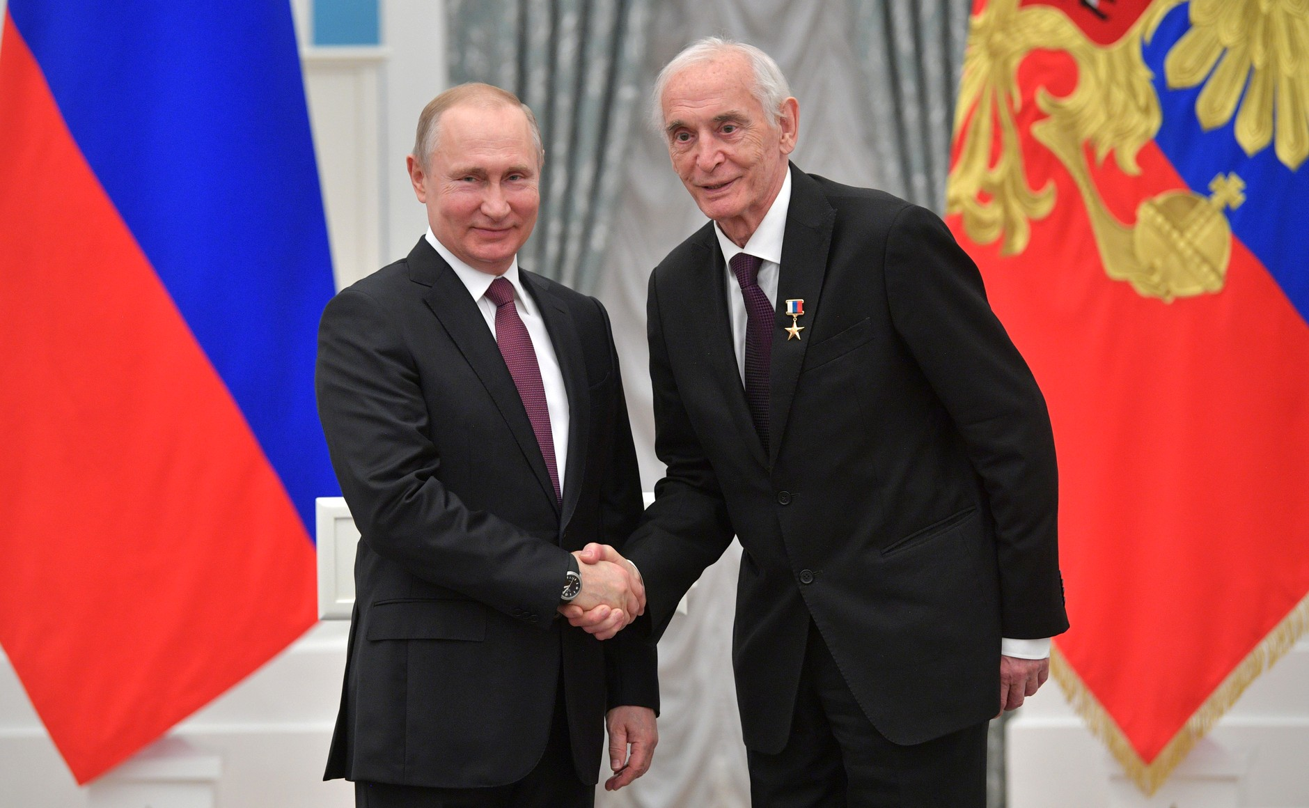 в Екатерининском зале Кремля состоялась церемония вручения золотых медалей «Герой Труда Российской Федерации» пятерым россиянам за особые заслуги перед государством и народом